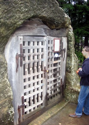 Daniil Sihastrul cave entrance, Romania